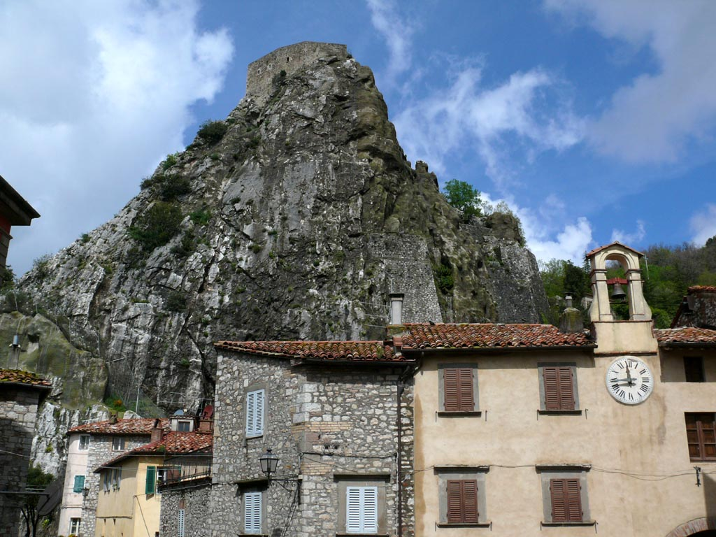 Roccalbegna, view